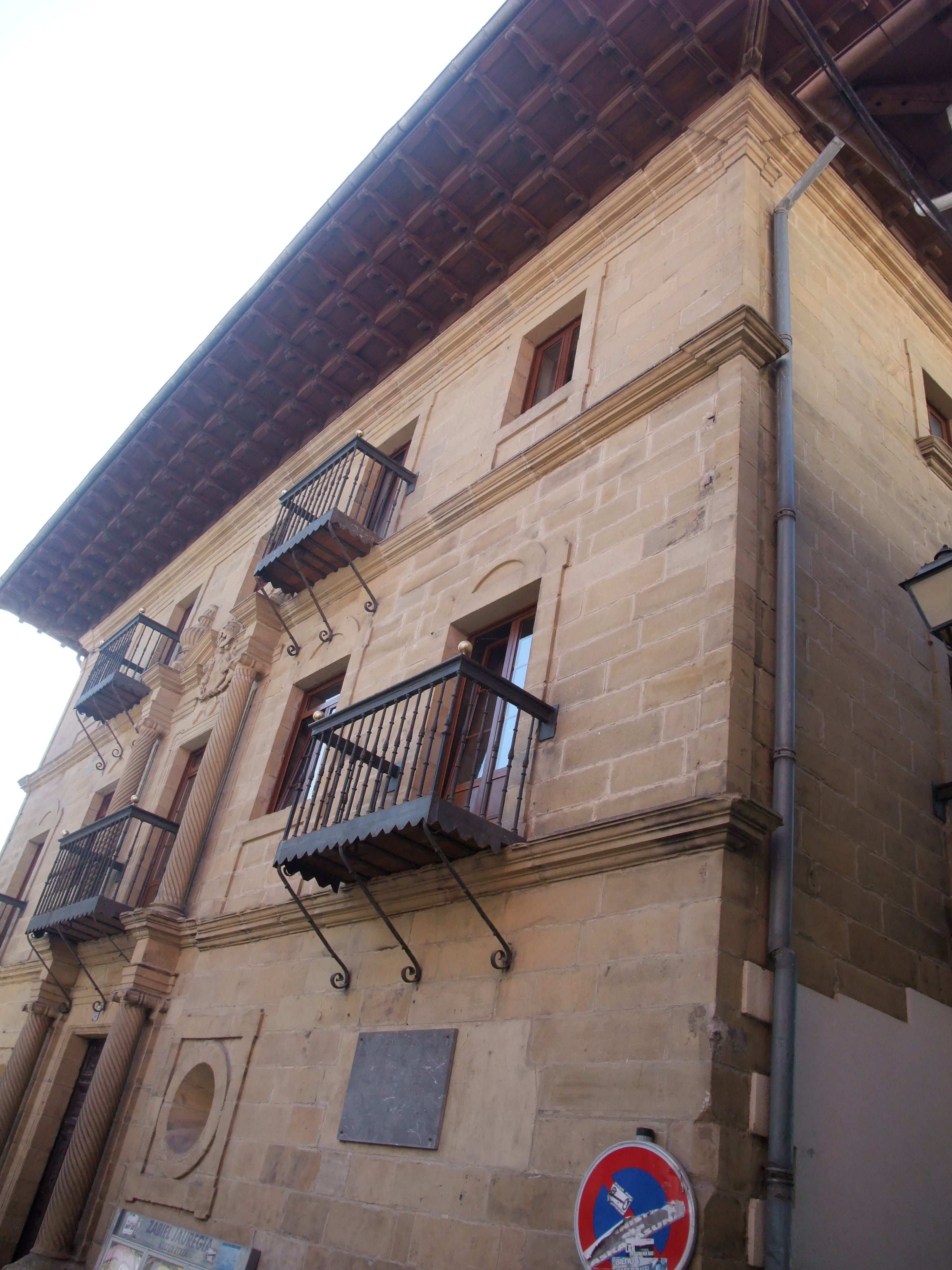 Mutriku (Guipúzcoa)-Palacio Zaibel-1